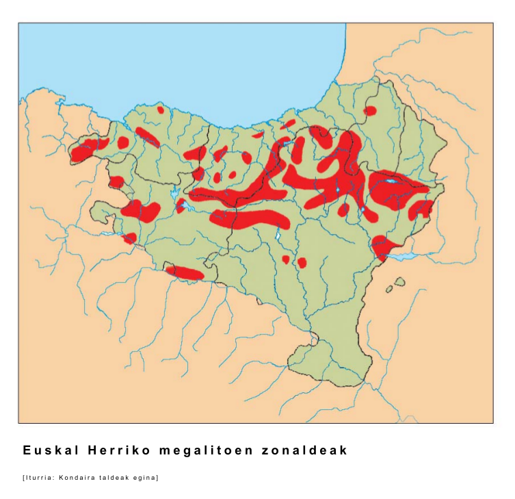 Euskal Herriko megalitoen zonaldeak, UEUren kondaira.eus webgunetik hartua.